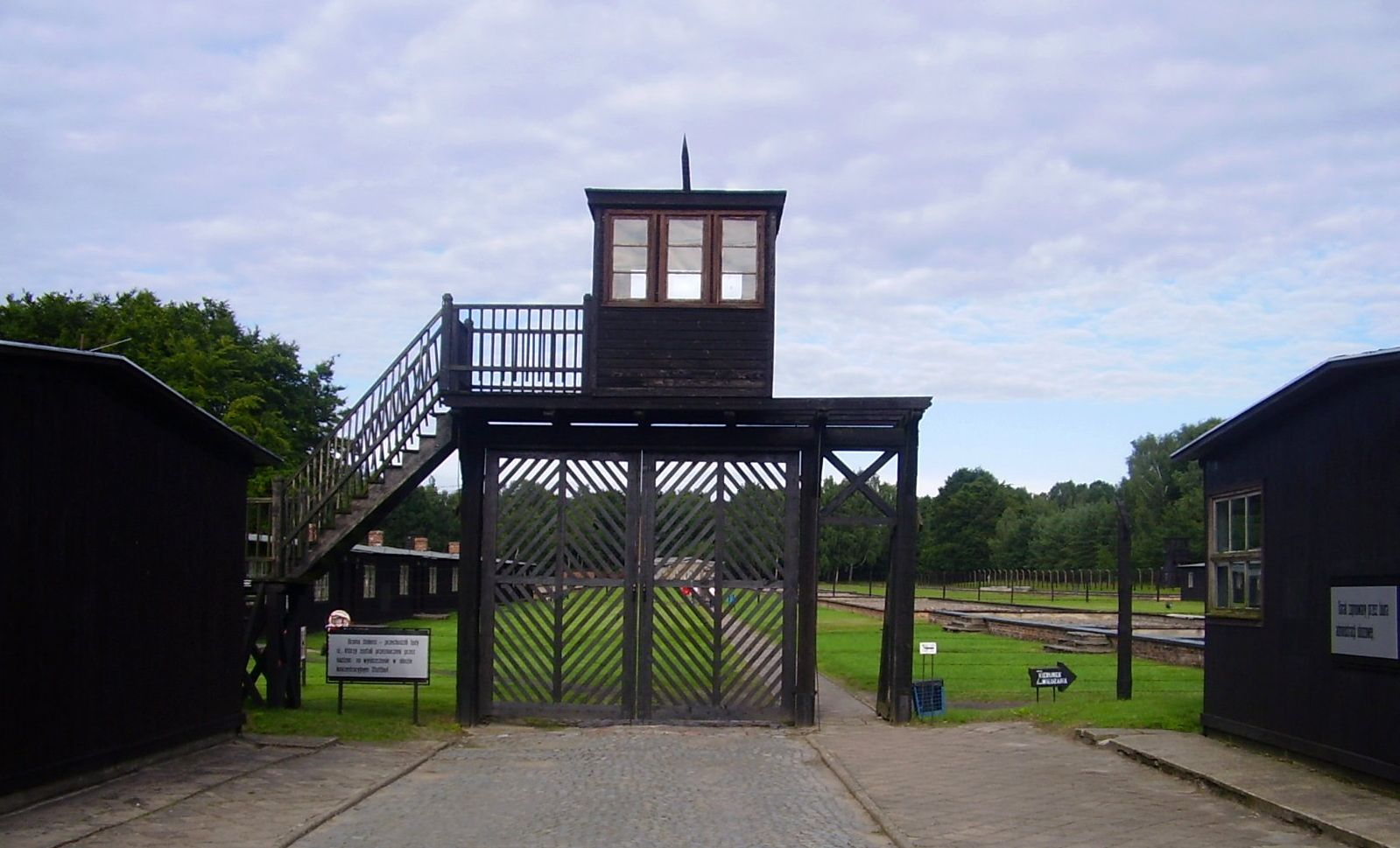 Brama śmierci w KL Stutthof